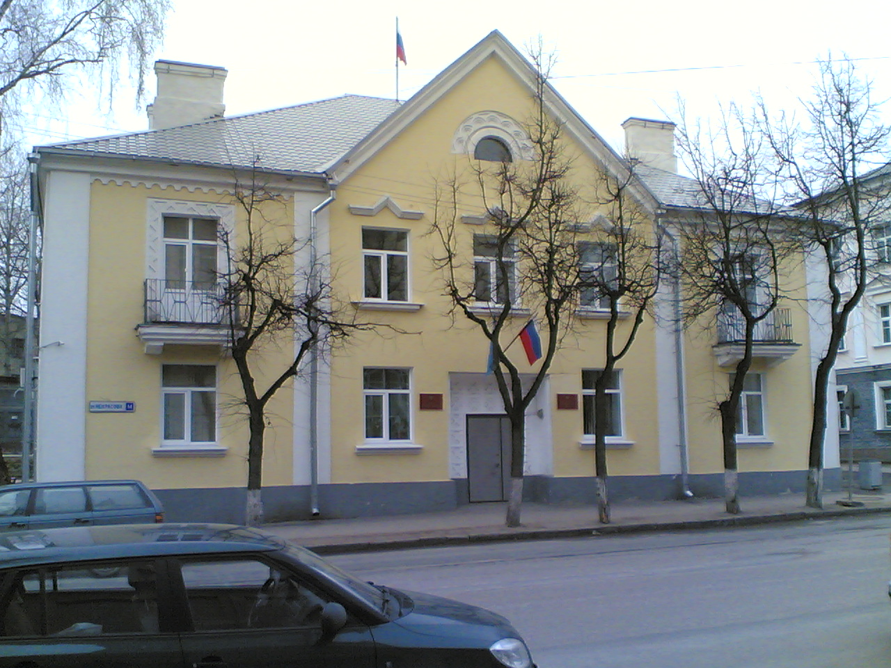 Здание Псковской городской Думы на ул. Некрасова, 14